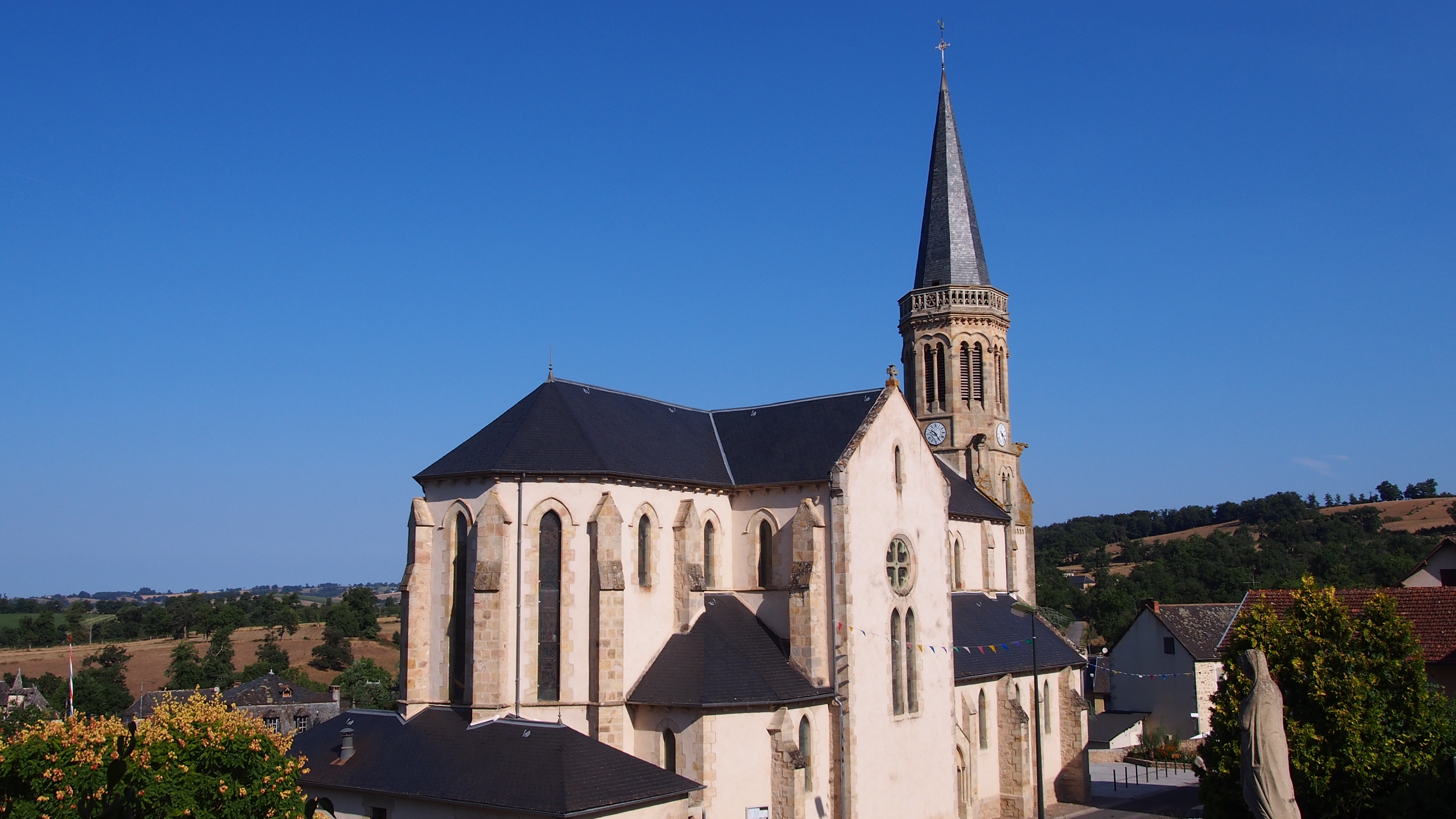 Saint-Salvadou (Occitanie, France). L'église Sainte-Madeleine.